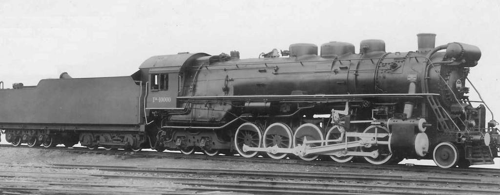 Паровоз Та постройки завода АЛКО (ALCO)